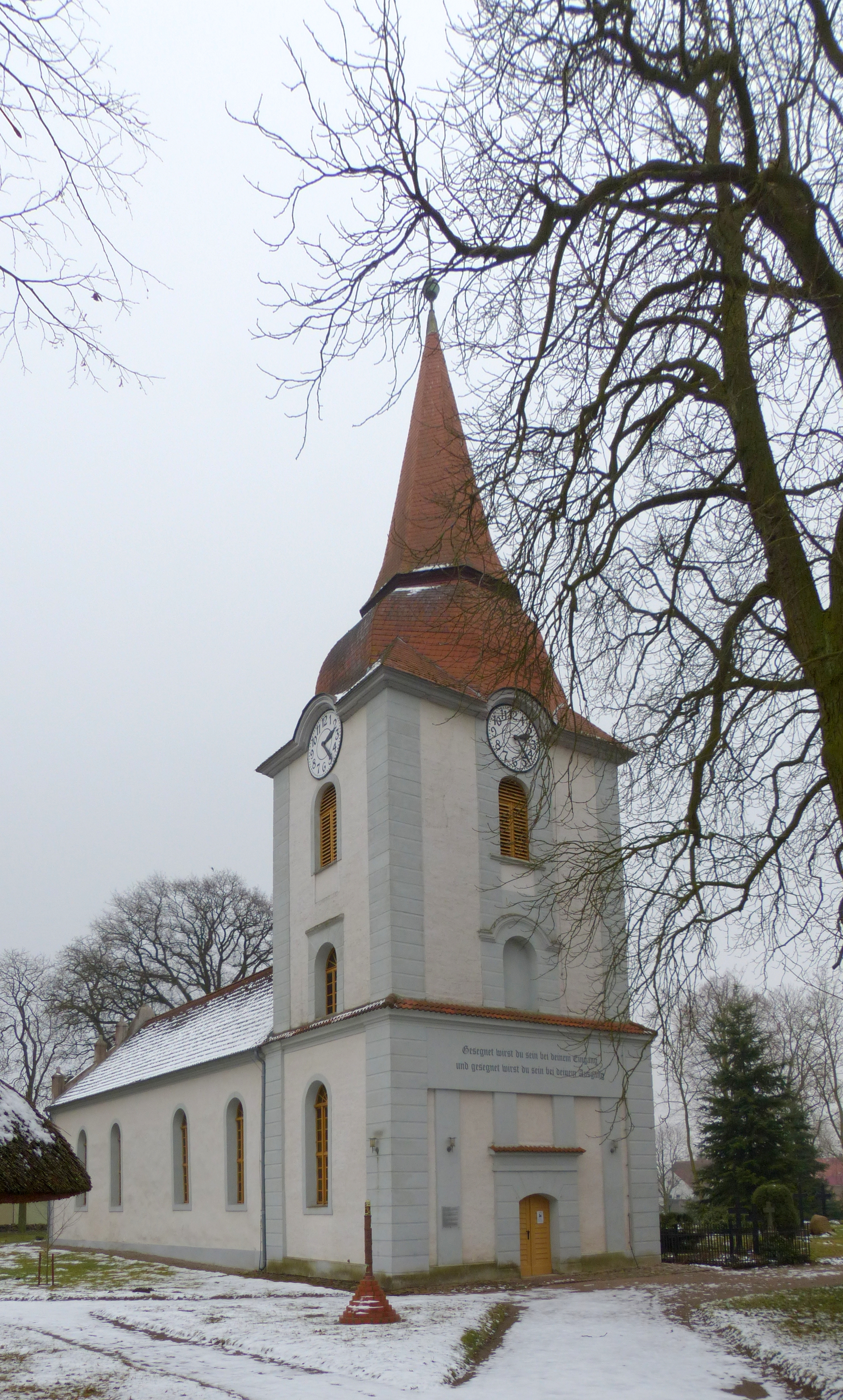 Kirche in Ducherow, Ansicht von Nordwesten